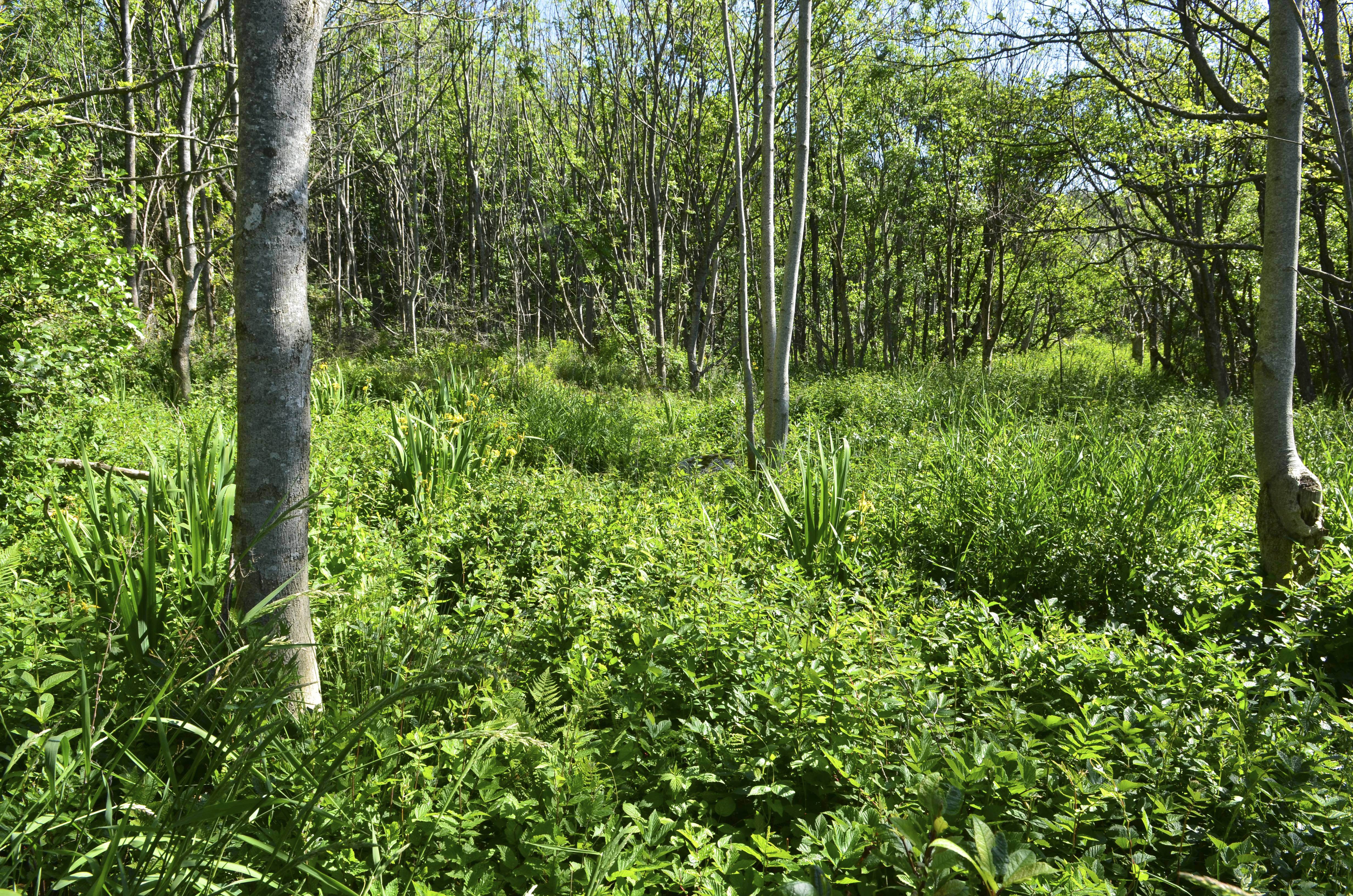 Svartorstrandskogen er fremtredende i den delen av reservatet som vender mot sjøen.